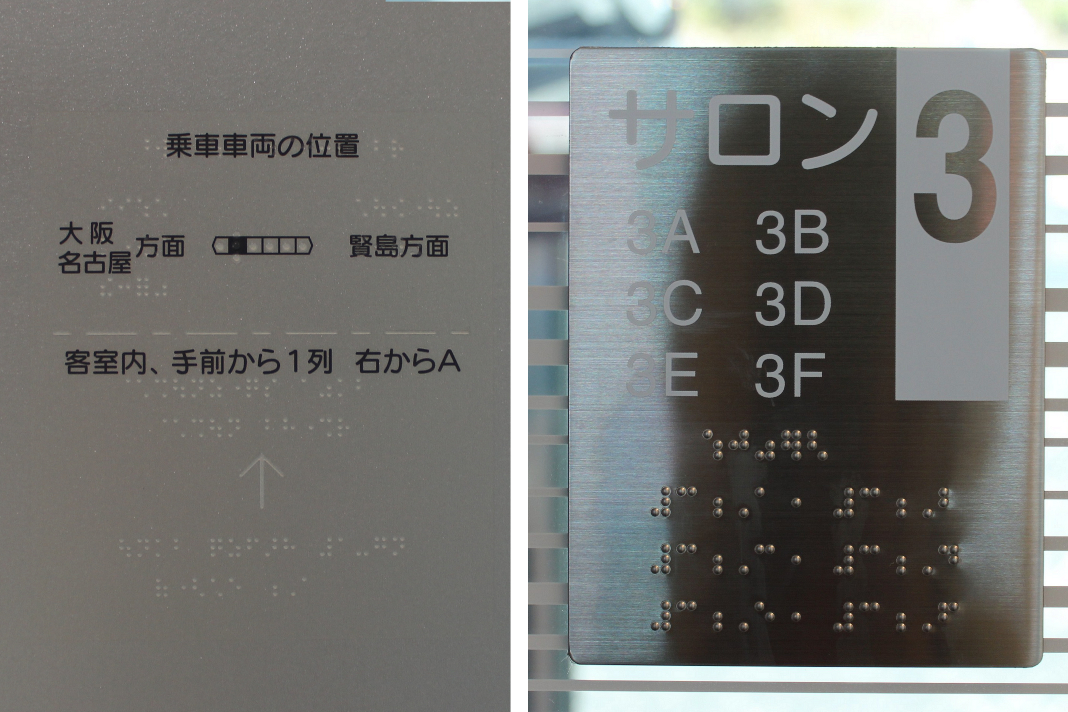 近鉄50000系車内の点字表記